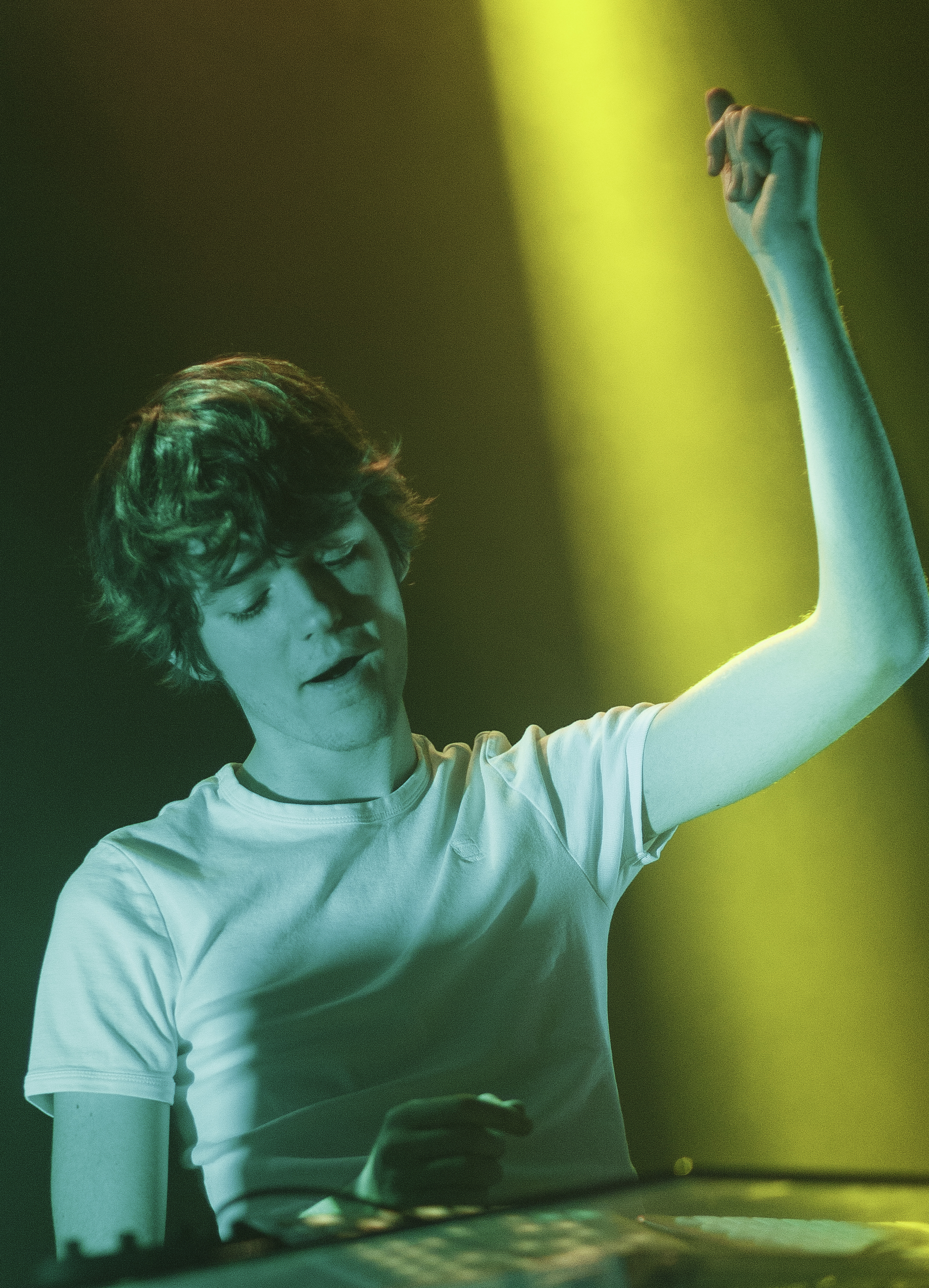 Madeon, Brussels Live, 04 april 2015